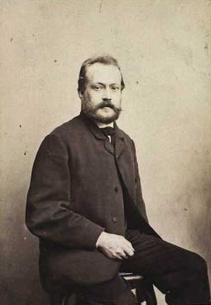 Johan Didrik Frisch (1835-1867), Danish painter